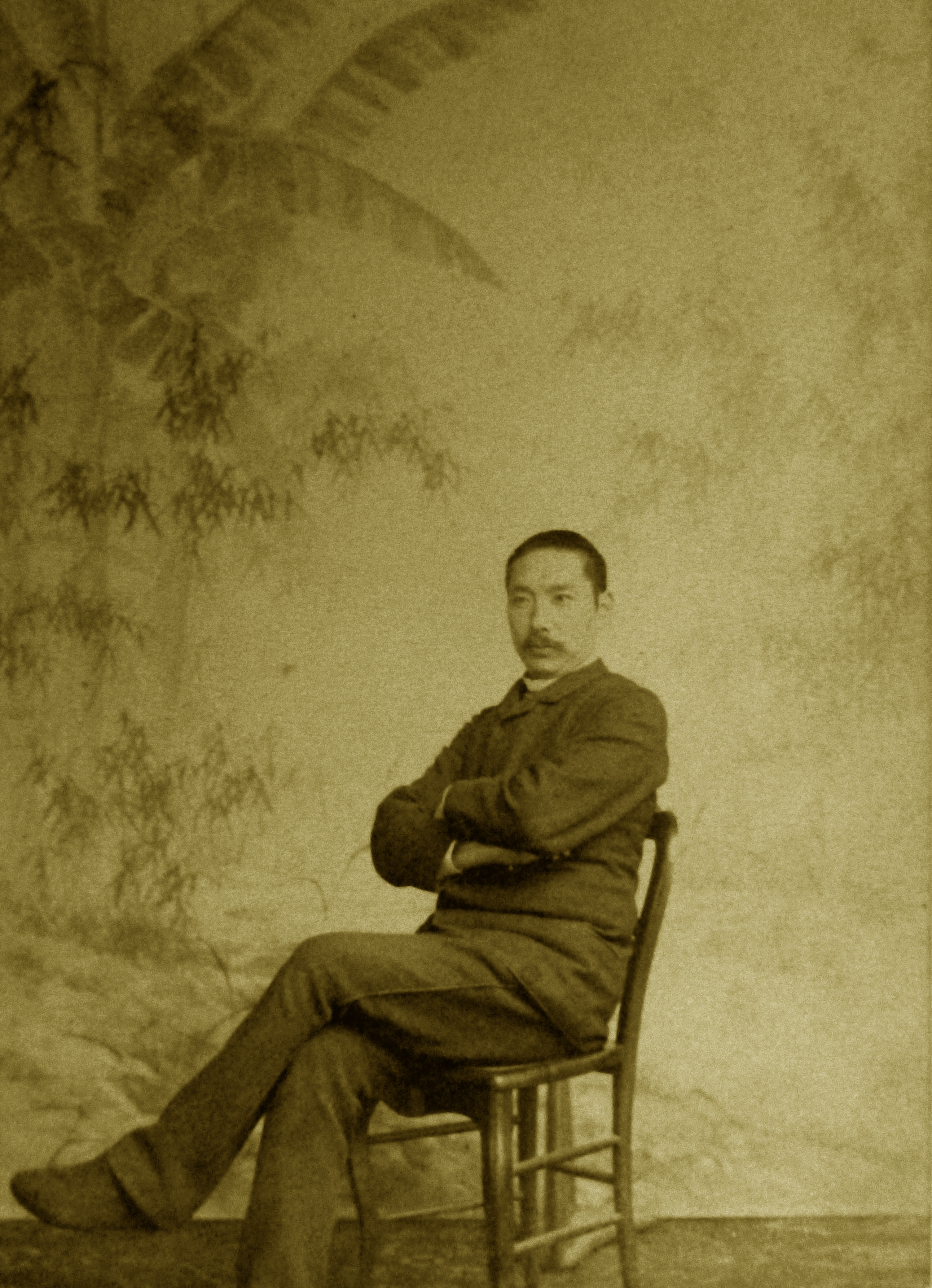 Photographie de l'artiste Hokkai Takashima posant sur une chaise devant l'une de ses oeuvres.